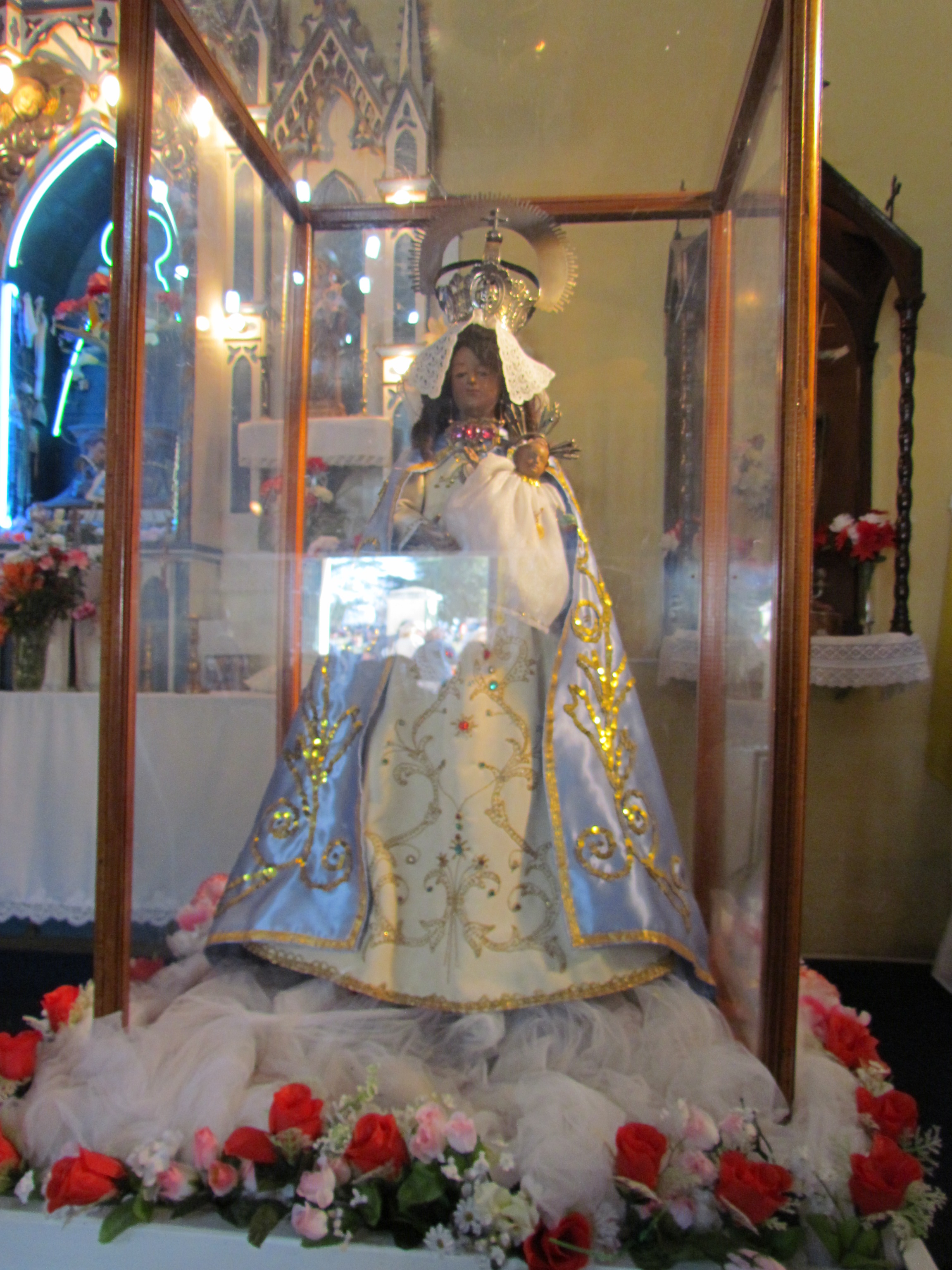 Nuestra Señora de los Remedios de Morante fuera de su camarín, detrás del altar (se ve en el fondo) previo a la procesión anual del 8 de septiembre.